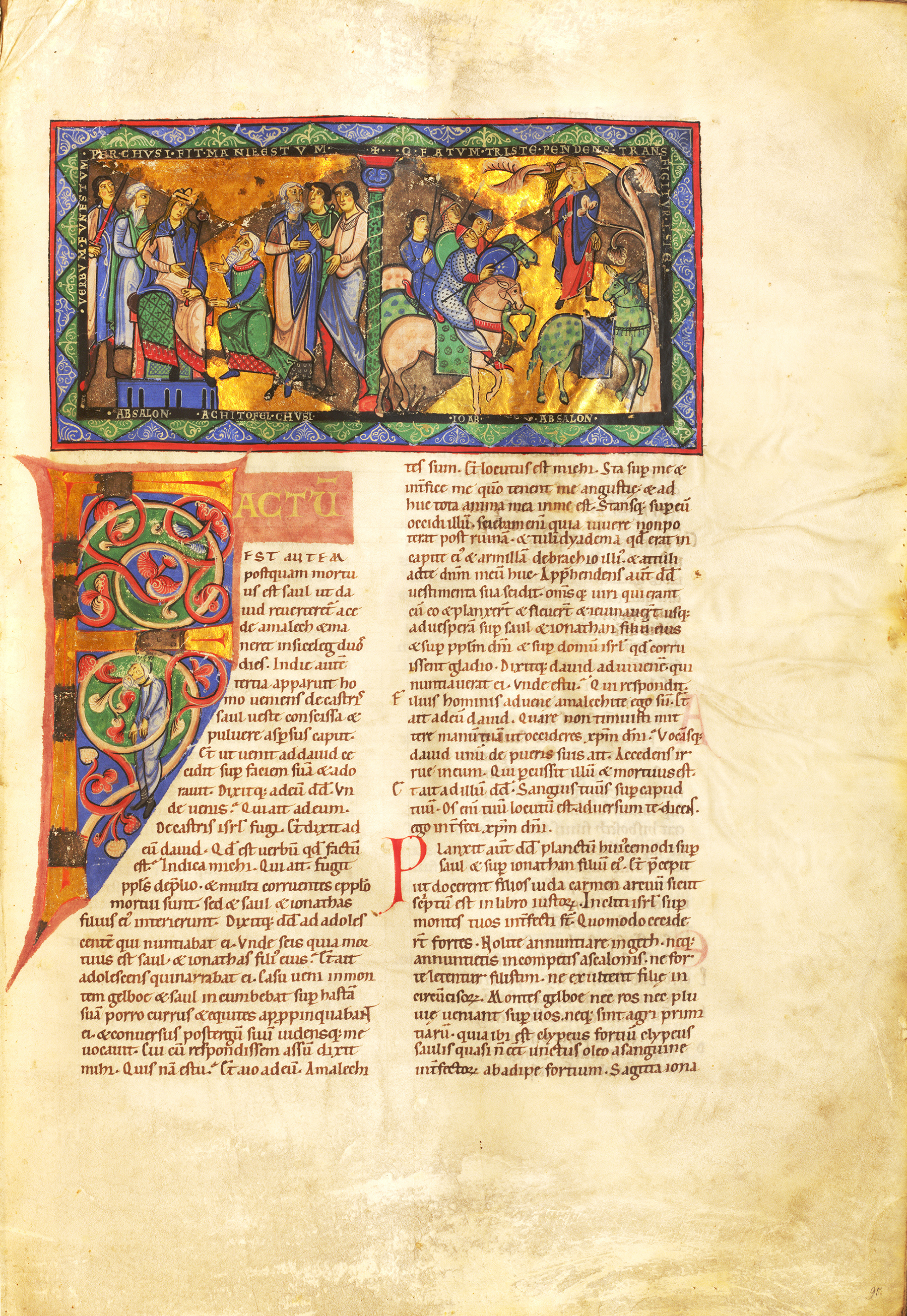 Initiale aus der Gumbertusbibel, Bl 95r, Regum Liber II, dargestellt sind Szenen aus dem Leben Absalons